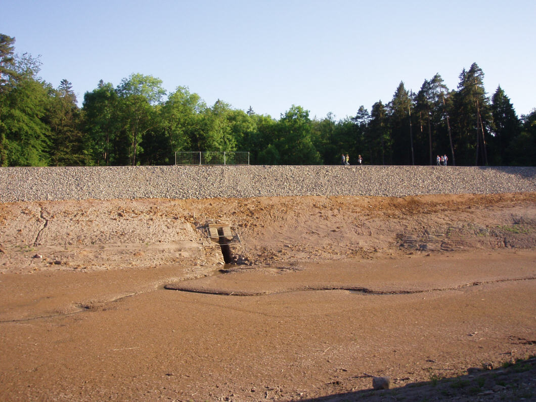 der abgelassene Neue See in Stuttgart